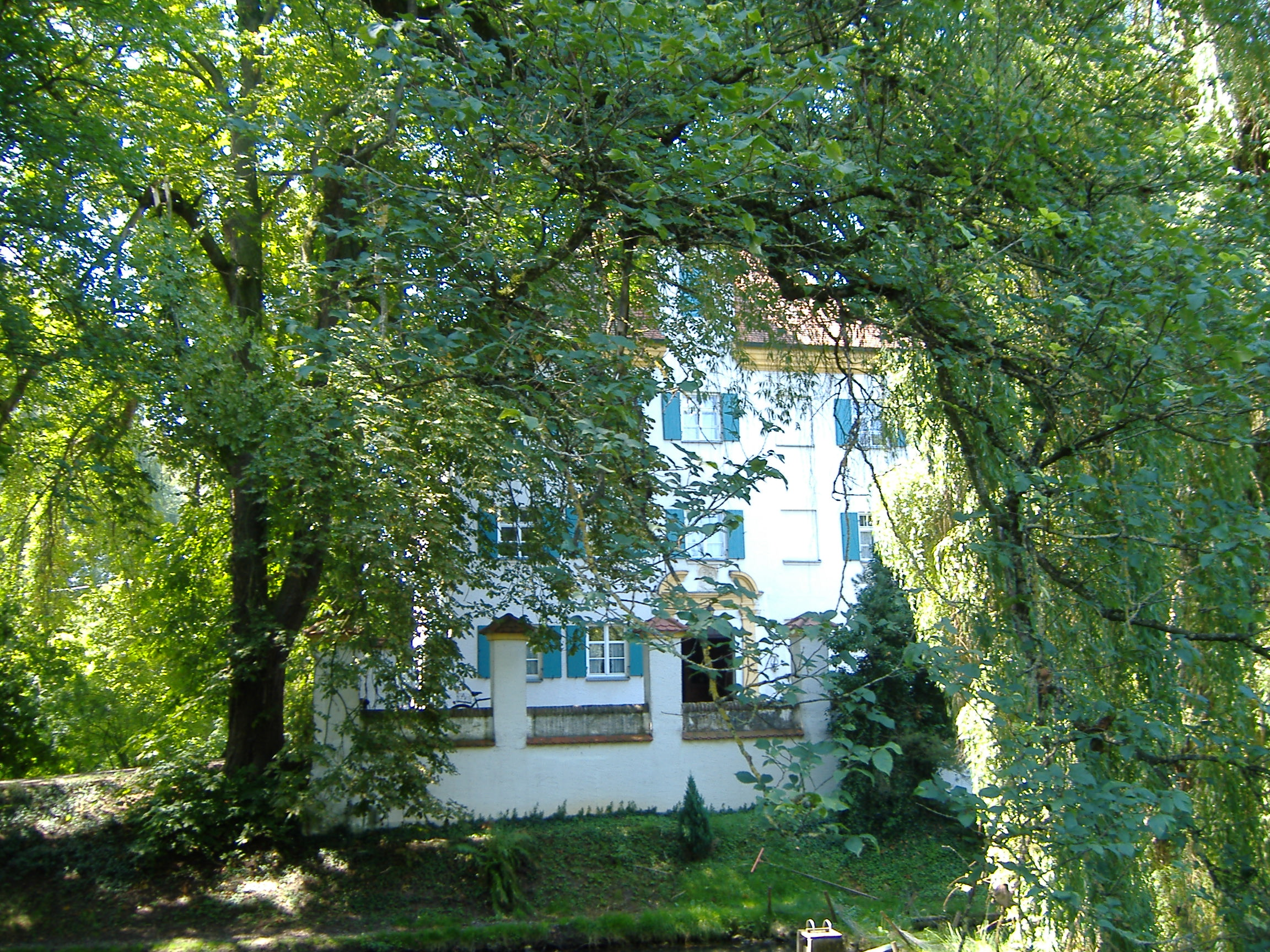 Schloss Großkötz